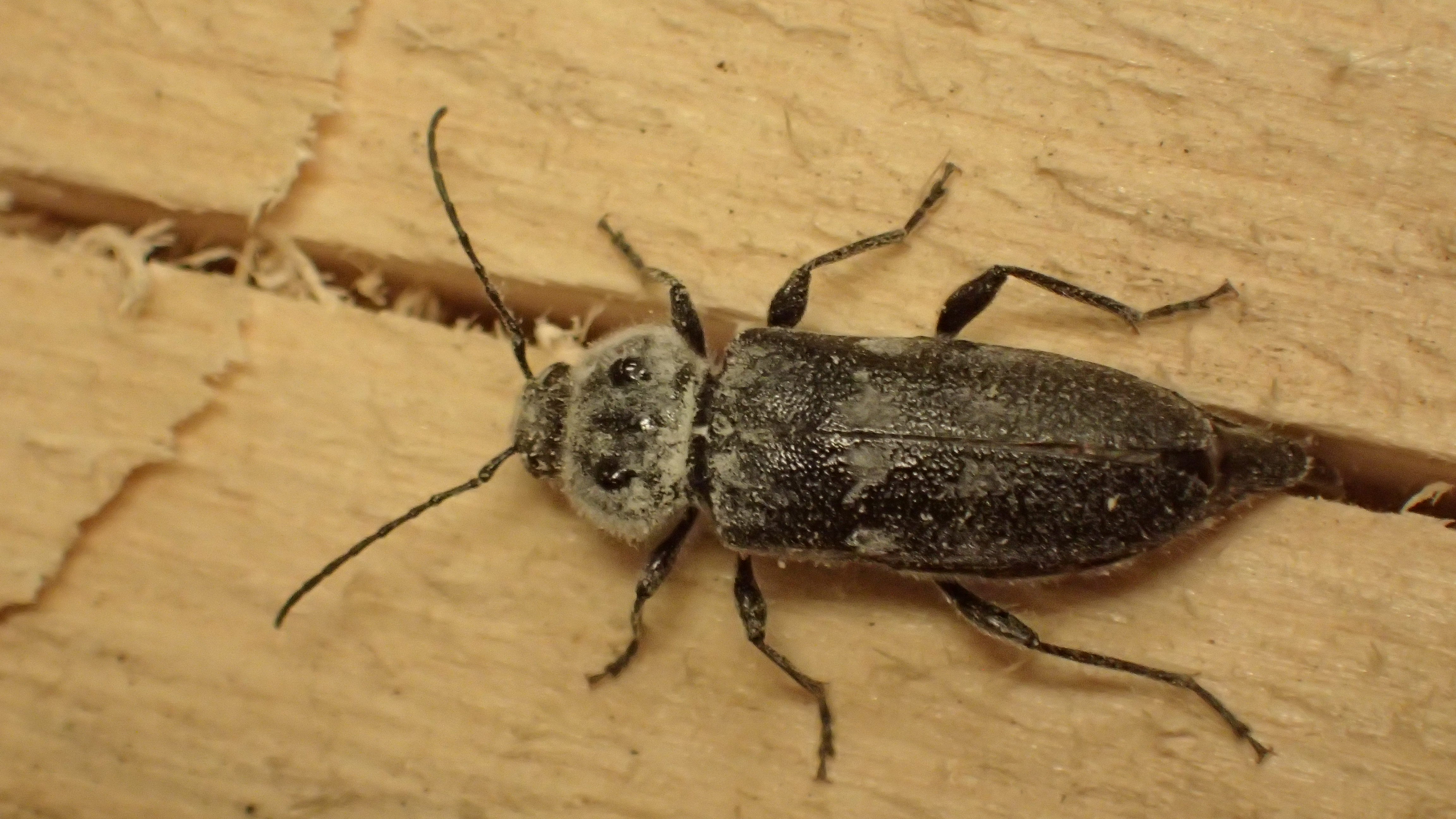 Eggleggende husbukkhunn.